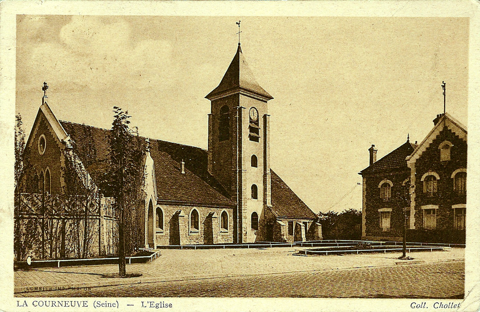 Eglise de La Courneuve